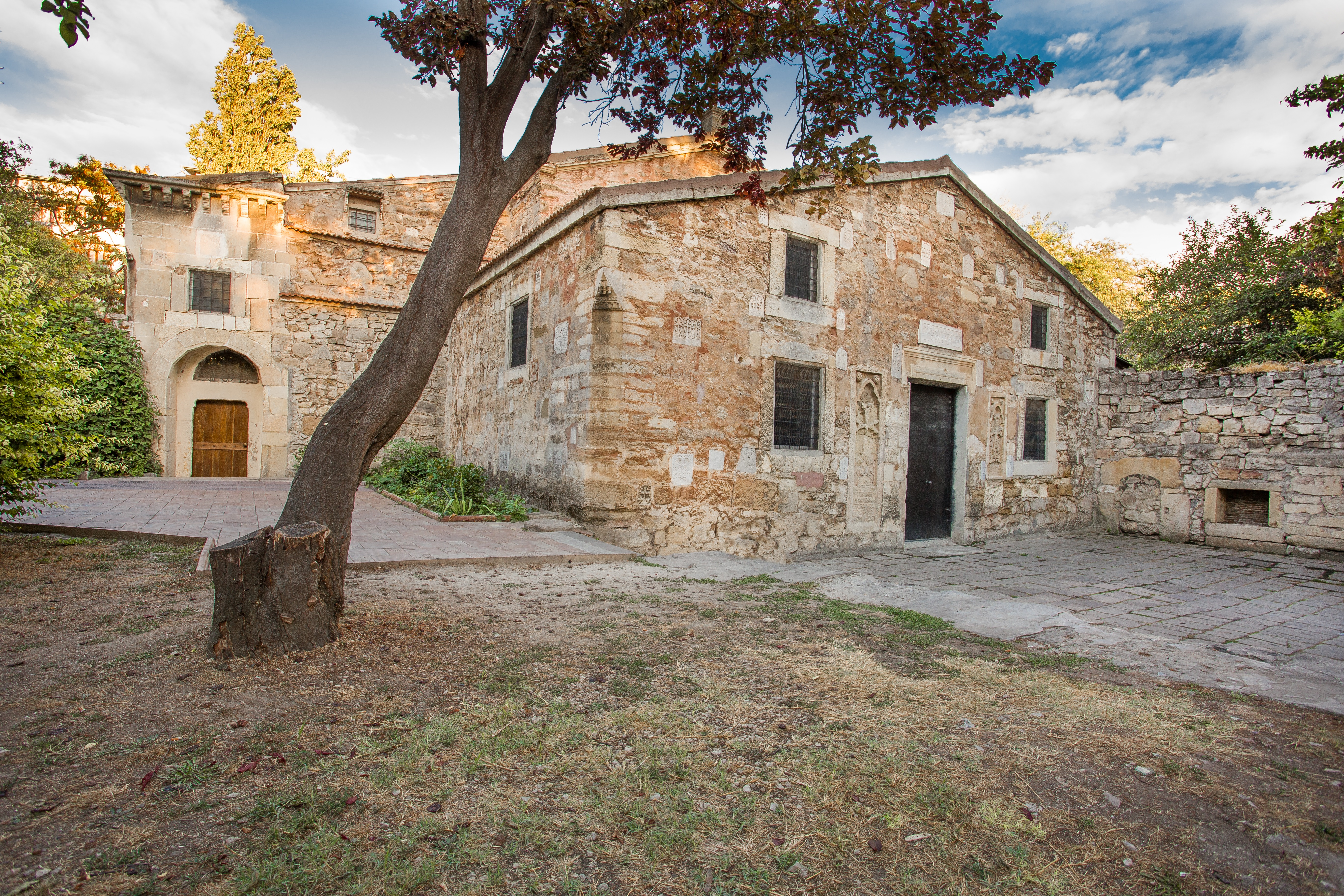 Церква Св. Сергія Феодосія